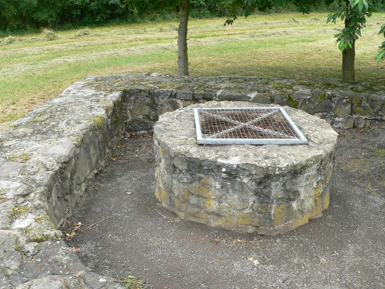 Brunnen der Ruine Burg Arnsburg, Hessen, Deutschland.